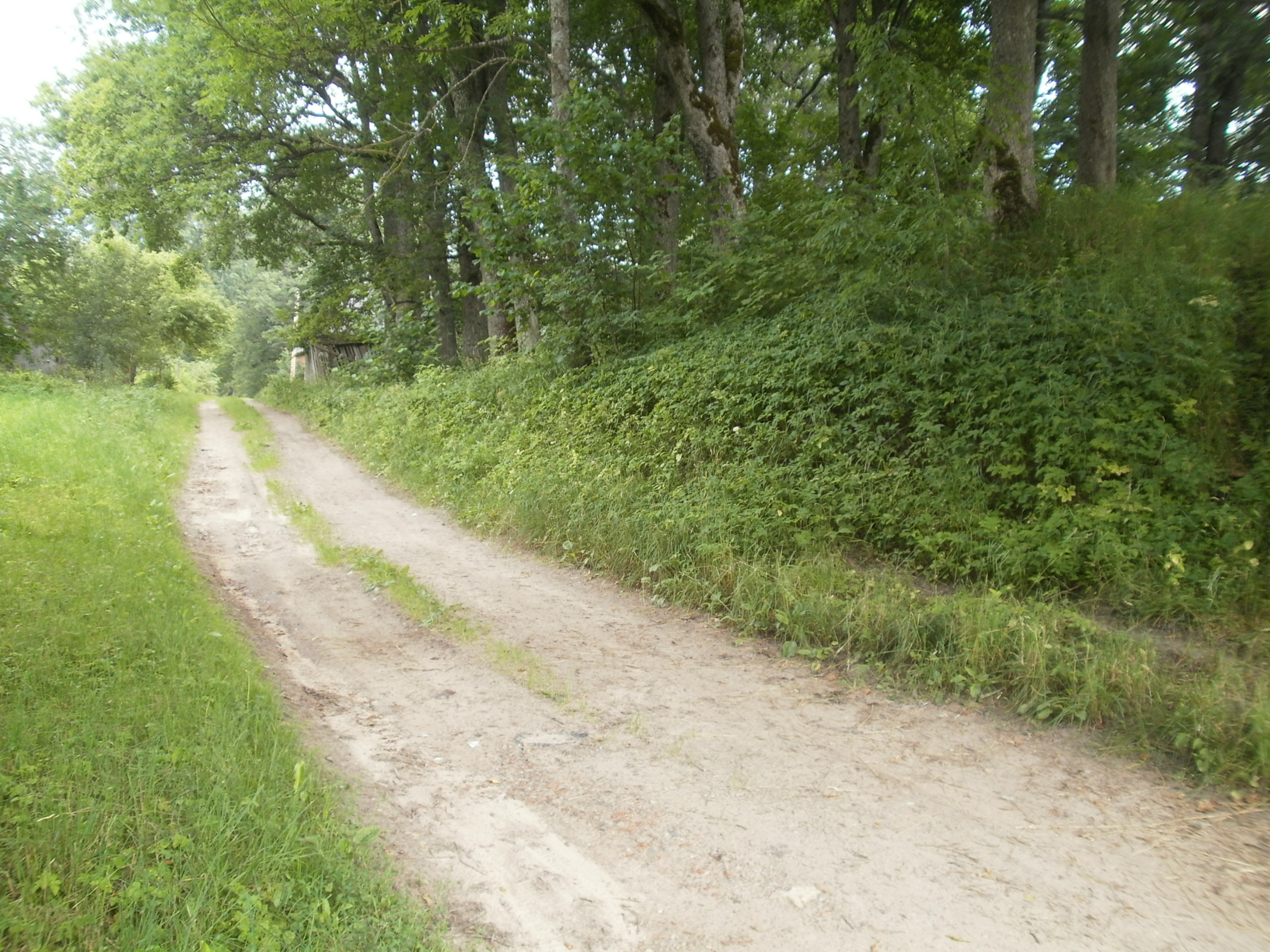 Lõuna-edelapoolne külg. Valli vahelt on sissekaevatud kruusatee. Juuli 2014.